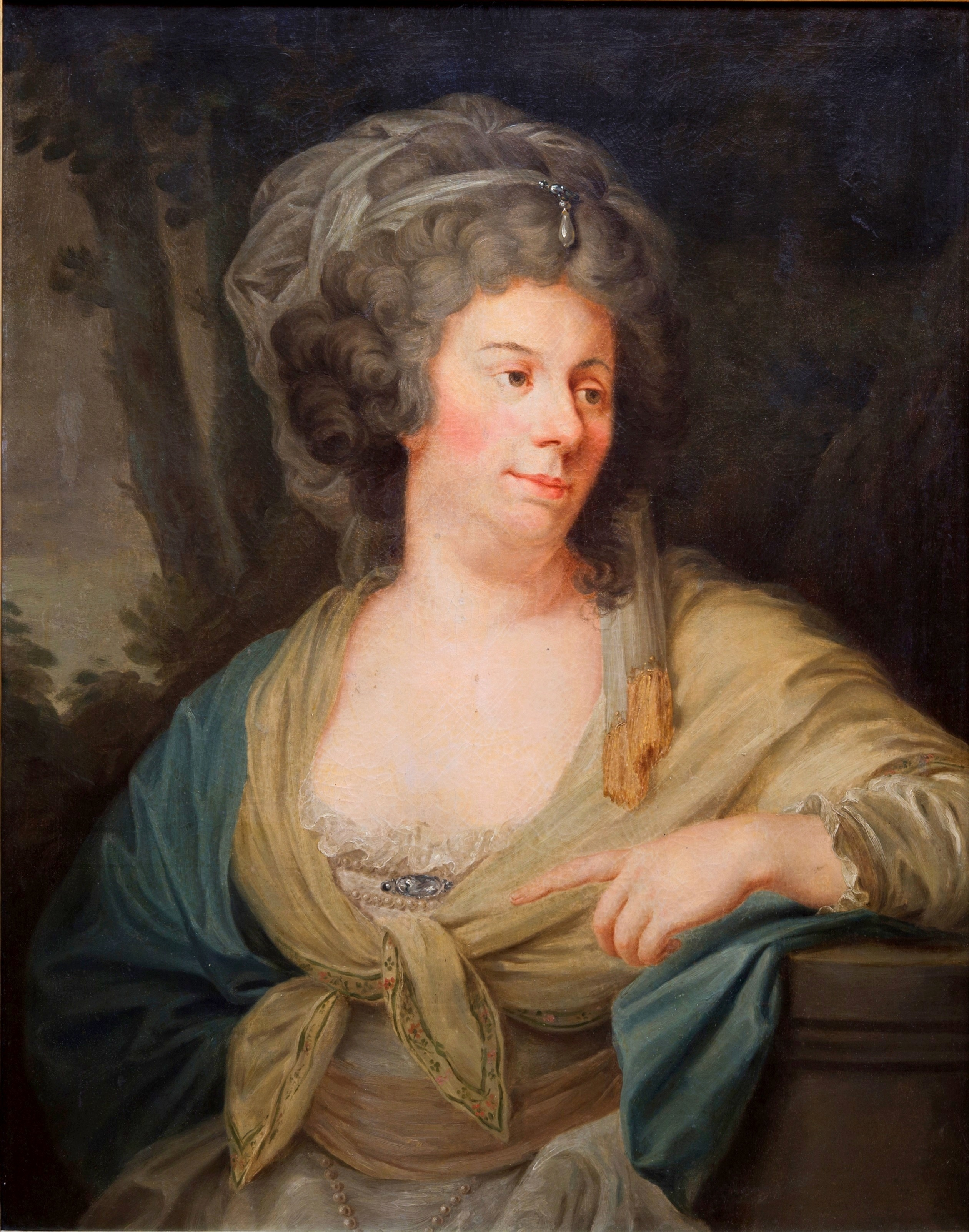 Portret Karoliny z Sapiehów Sołtykowej